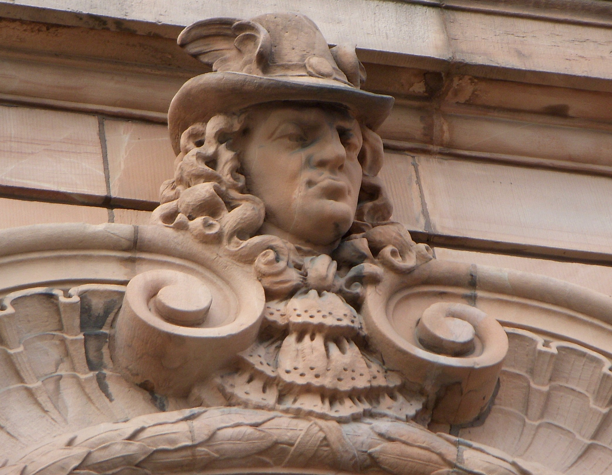 Skepsbron 8, Stockholm, detalj